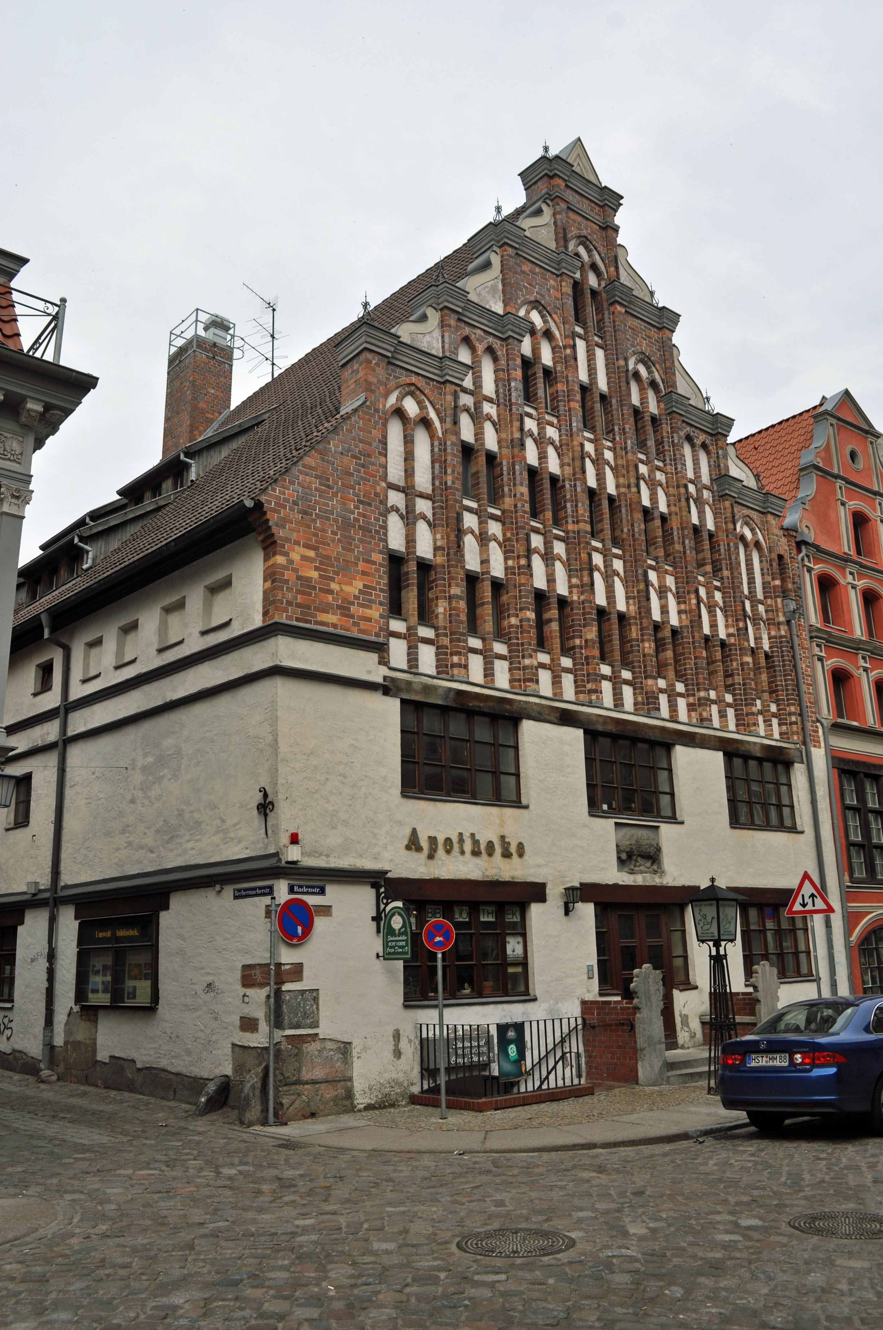 Gebäude bzw. Gebäudedetail in Stralsund. Straße und Hausnummer siehe Dateiname.